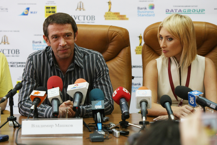 Владимир Машков, советский и российский актёр. Пресс-конференция Владимира Машкова и Алексея Учителя, Одесский международный кинофестиваль 2010. Depicted people: Владимир Машков and Виктория Тигипко